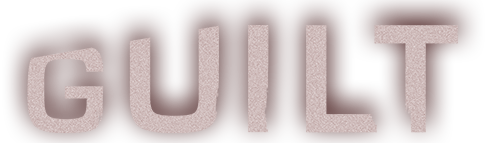 Logo de la série.